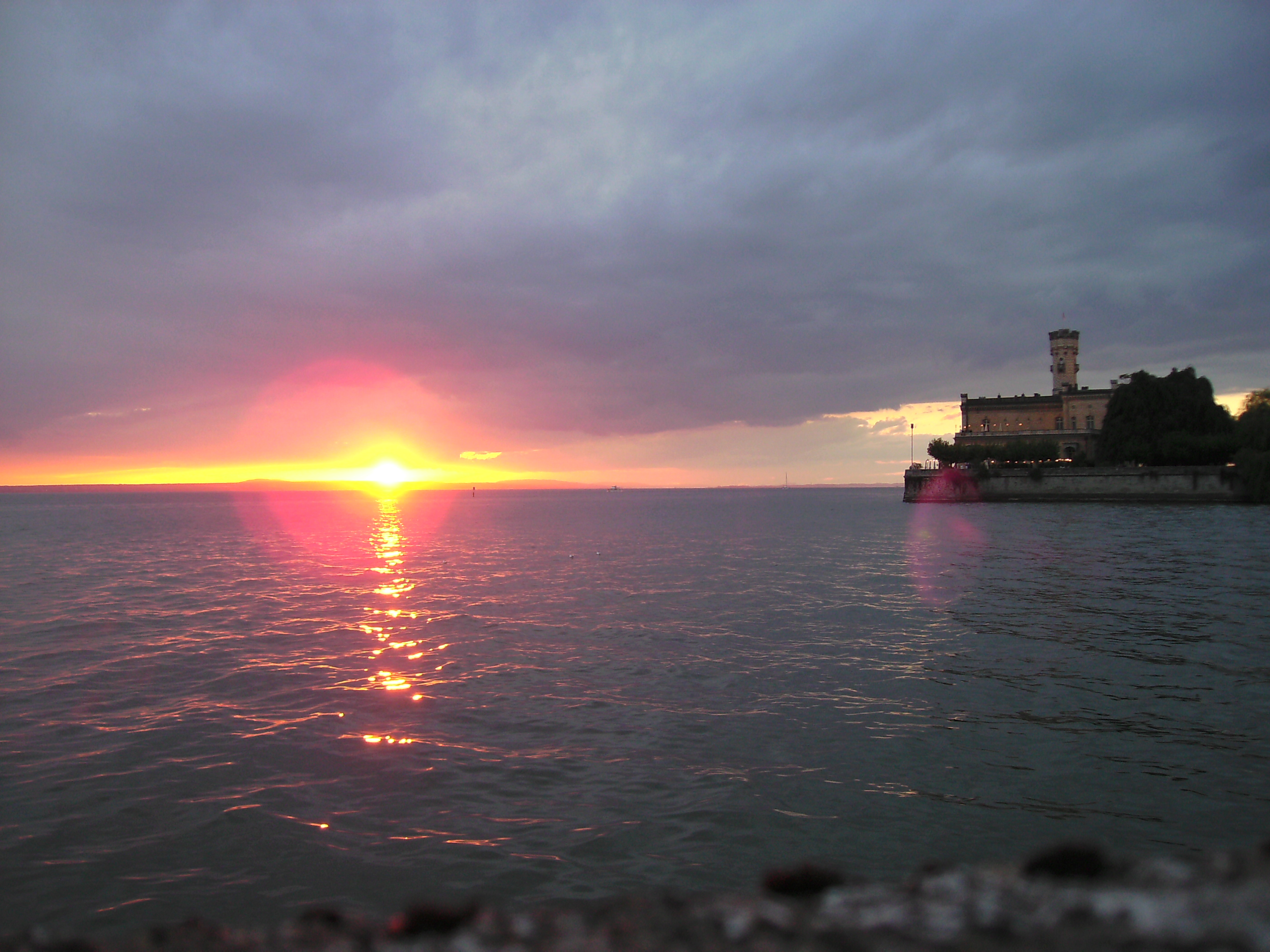 Langenargen: Schloss Montfort im Sonnenuntergang.